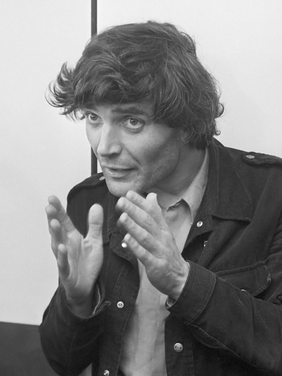 Journalisten en priesters terug uit Chili na de militaire coup op Schiphol, journalist Koos Koster 1 oktober 1973